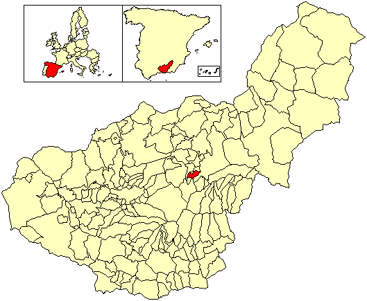 Situación del término municipal de Beas de Guadix respecto a la provincia de Granada, en España.